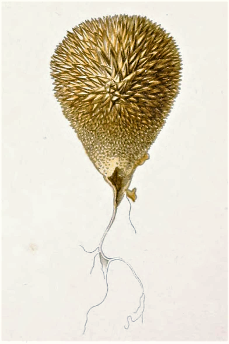 Léon Dufour: Lycoperdon echinatum Pers. (1796)